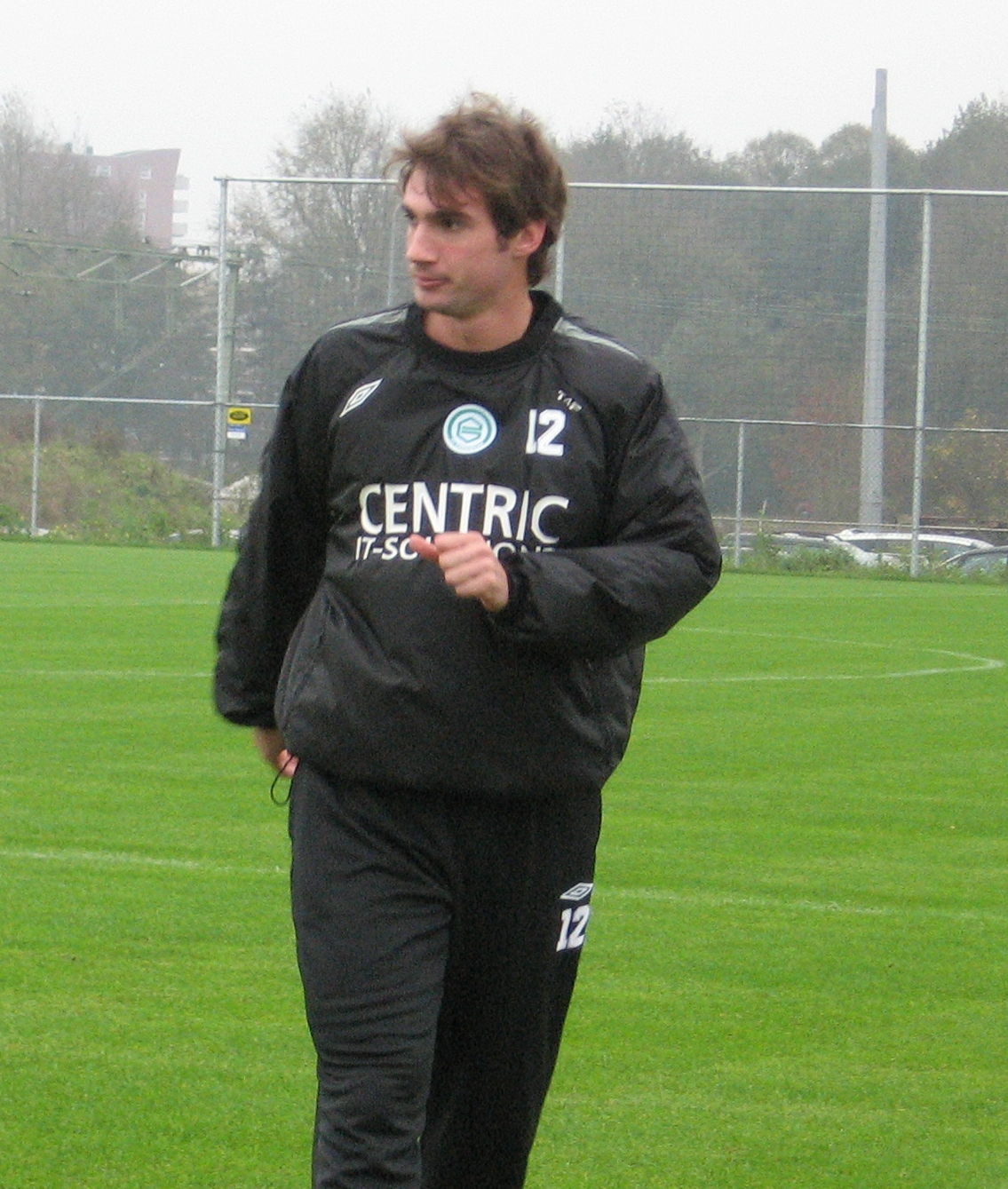 FC Groningen-speler Goran Lovre